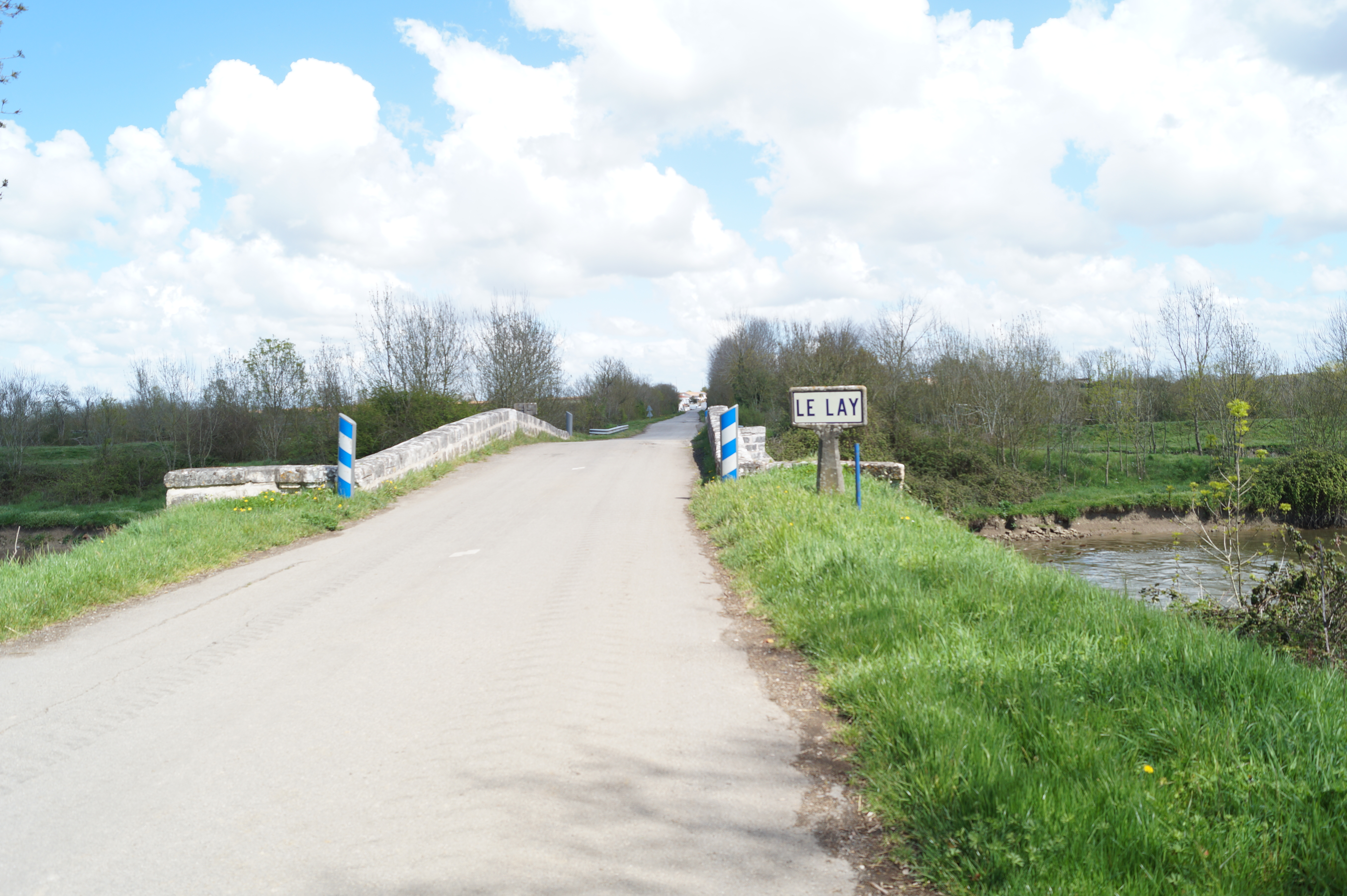 Une borne Michelin indiquant le passage du Lay depuis la départementale 2949, à Saint-Cyr-en-Talmondais.